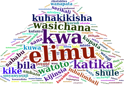 Kiswahili: Jalada hii ni Wingu wa maneno (tag cloud au word cloud)